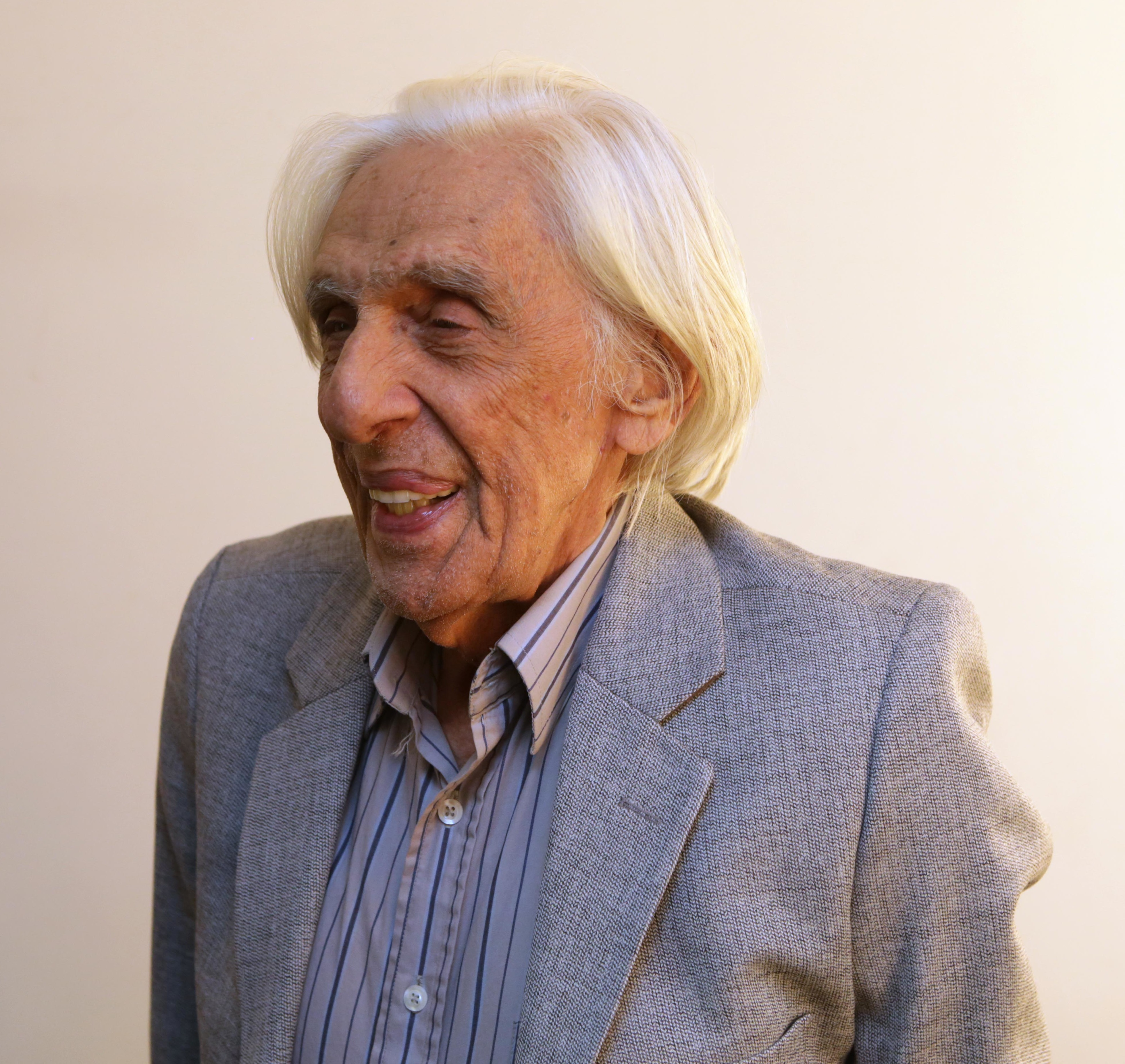 Convidado: Ferreira Gullar, poeta, crítico de arte e ensaísta brasileiro Data: 30 de setembro de 2015 Local: Teatro Cetip – São Paulo Crédito: Greg Salibian